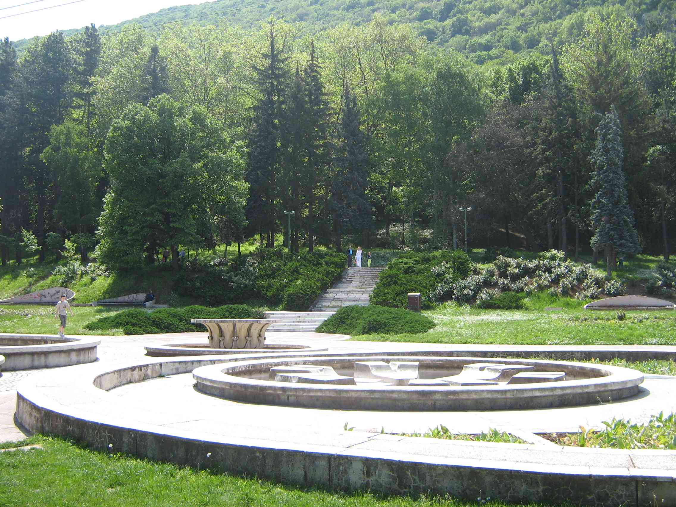 Dragan Cvetkovic Nis Niska Banja sopstvena slika 2008